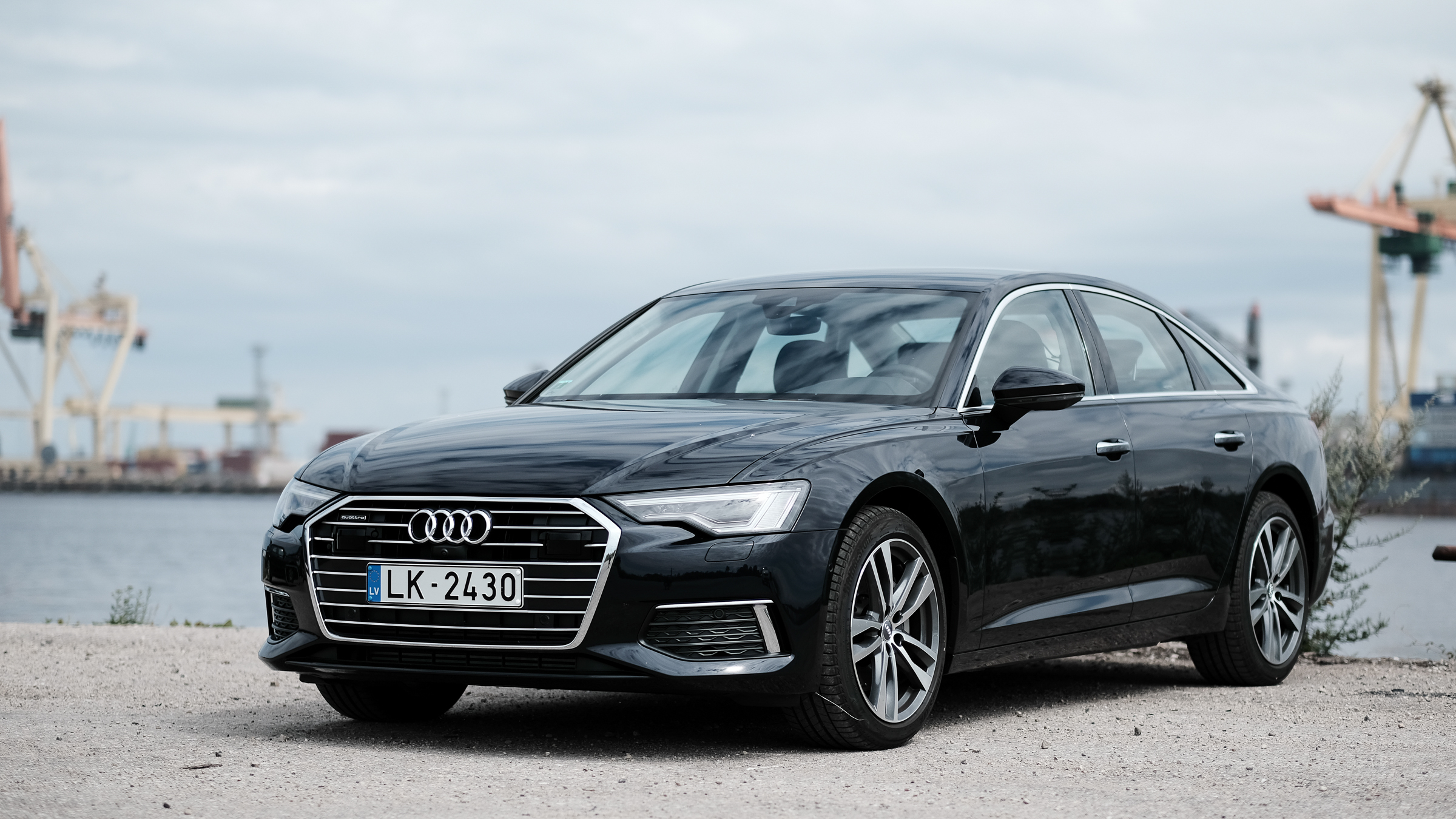 Audi A6 2018